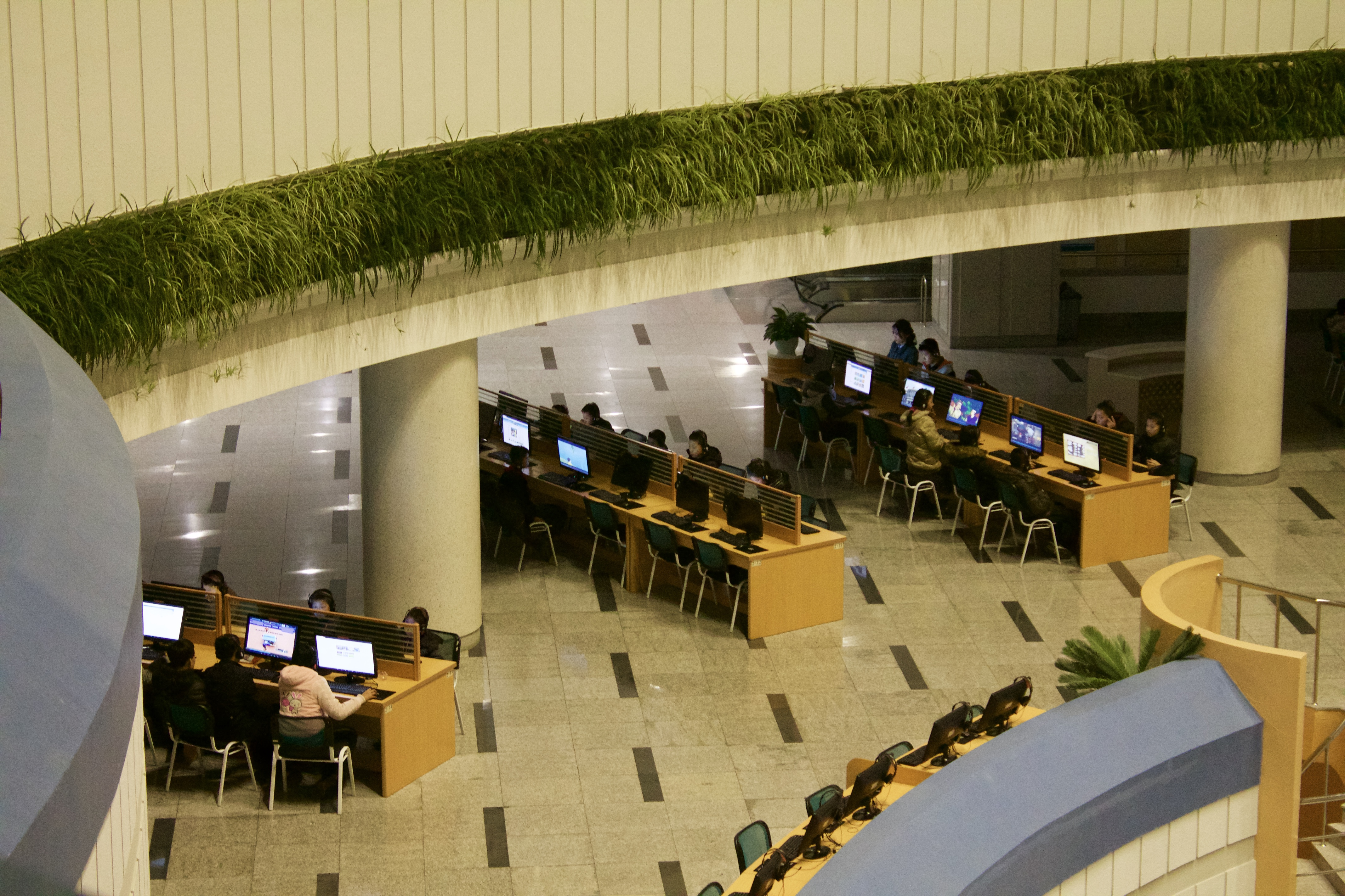 Pyongyang Sci Tech Center